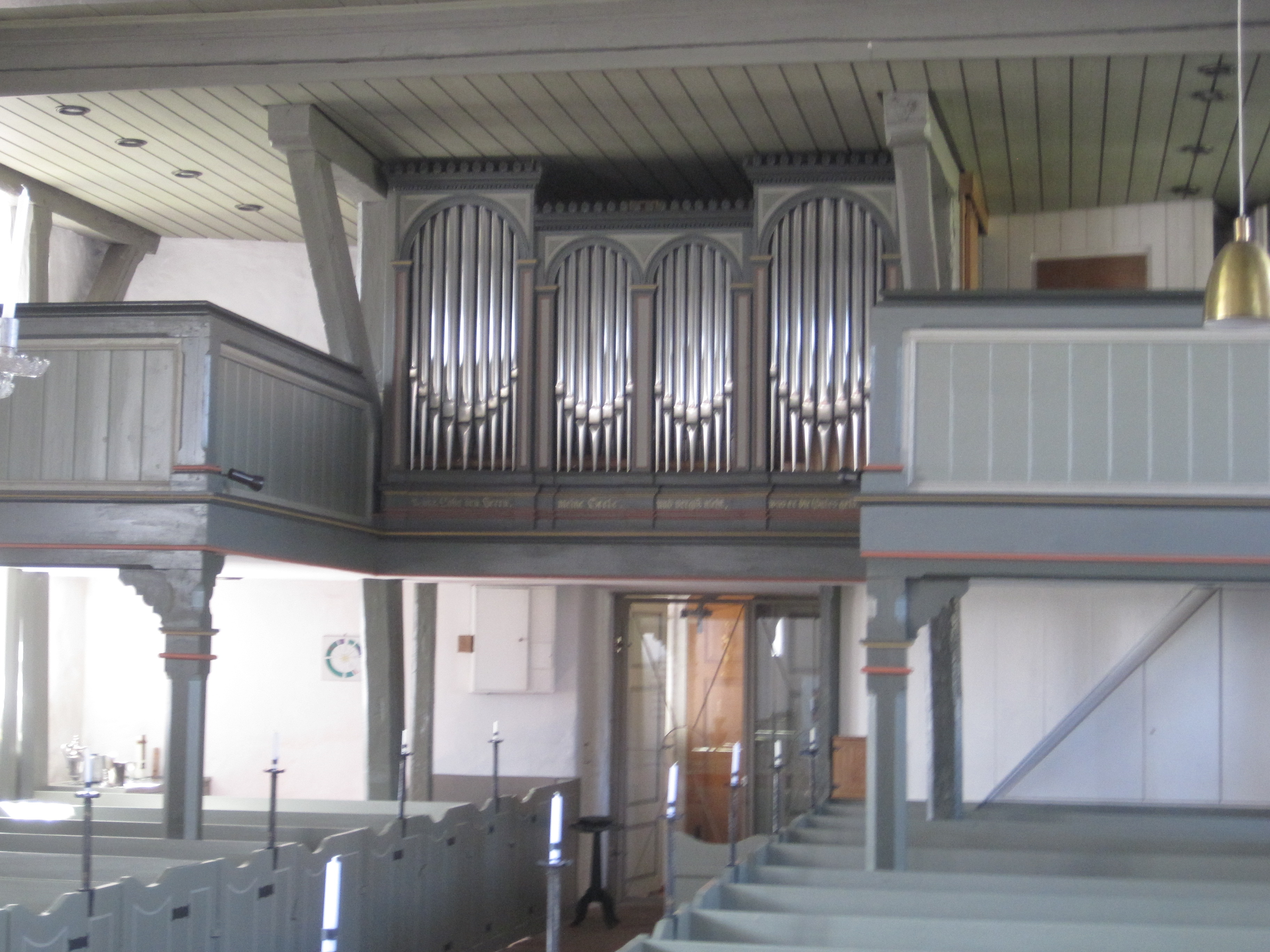 Orgel in Ziethen (Lauenburg)